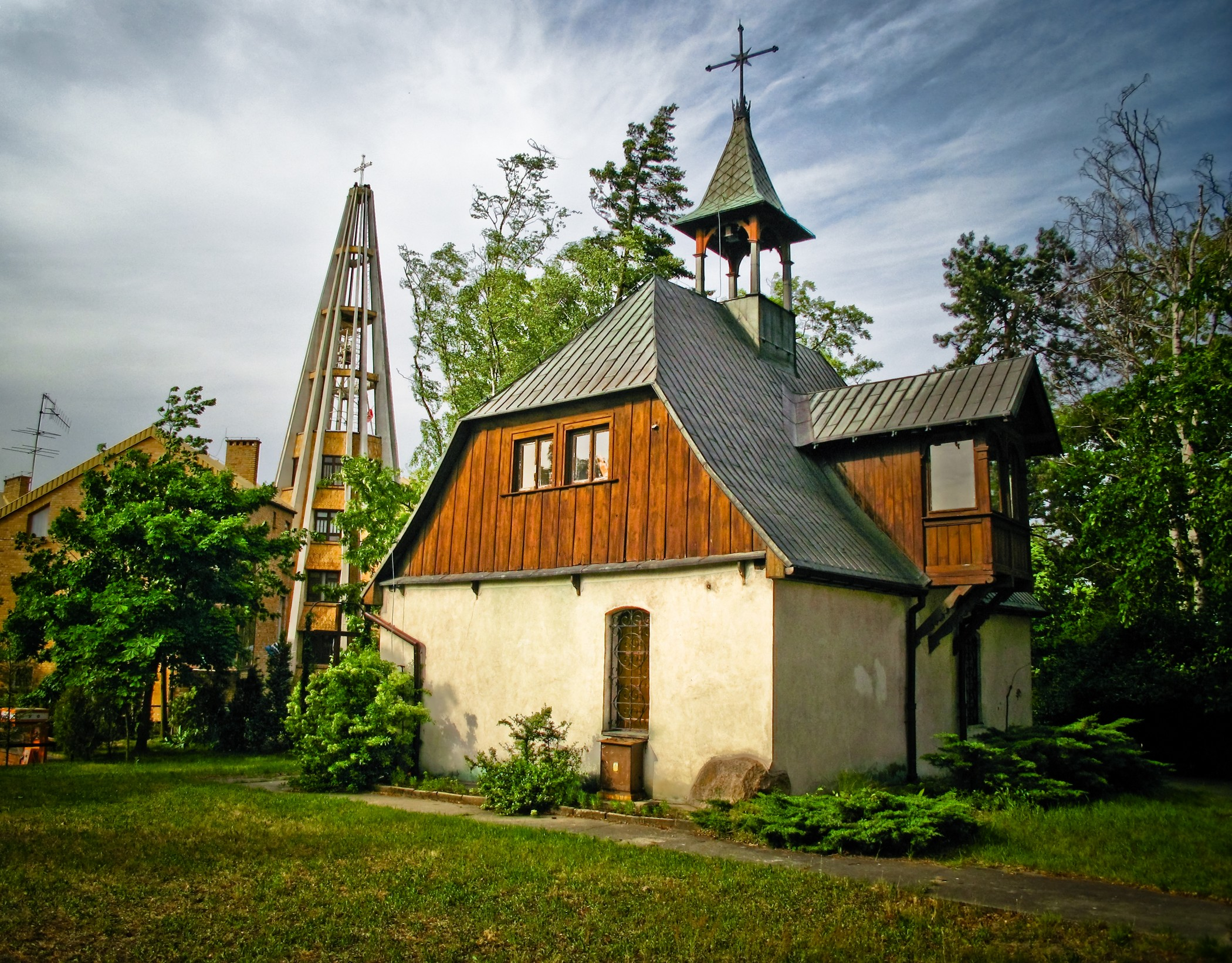 Kapliczka na Winnicy w Zielonej Górze, widok strony wschodniej